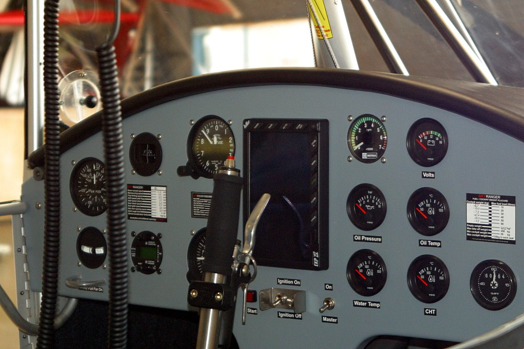 Best Off Skyranger Cockpit